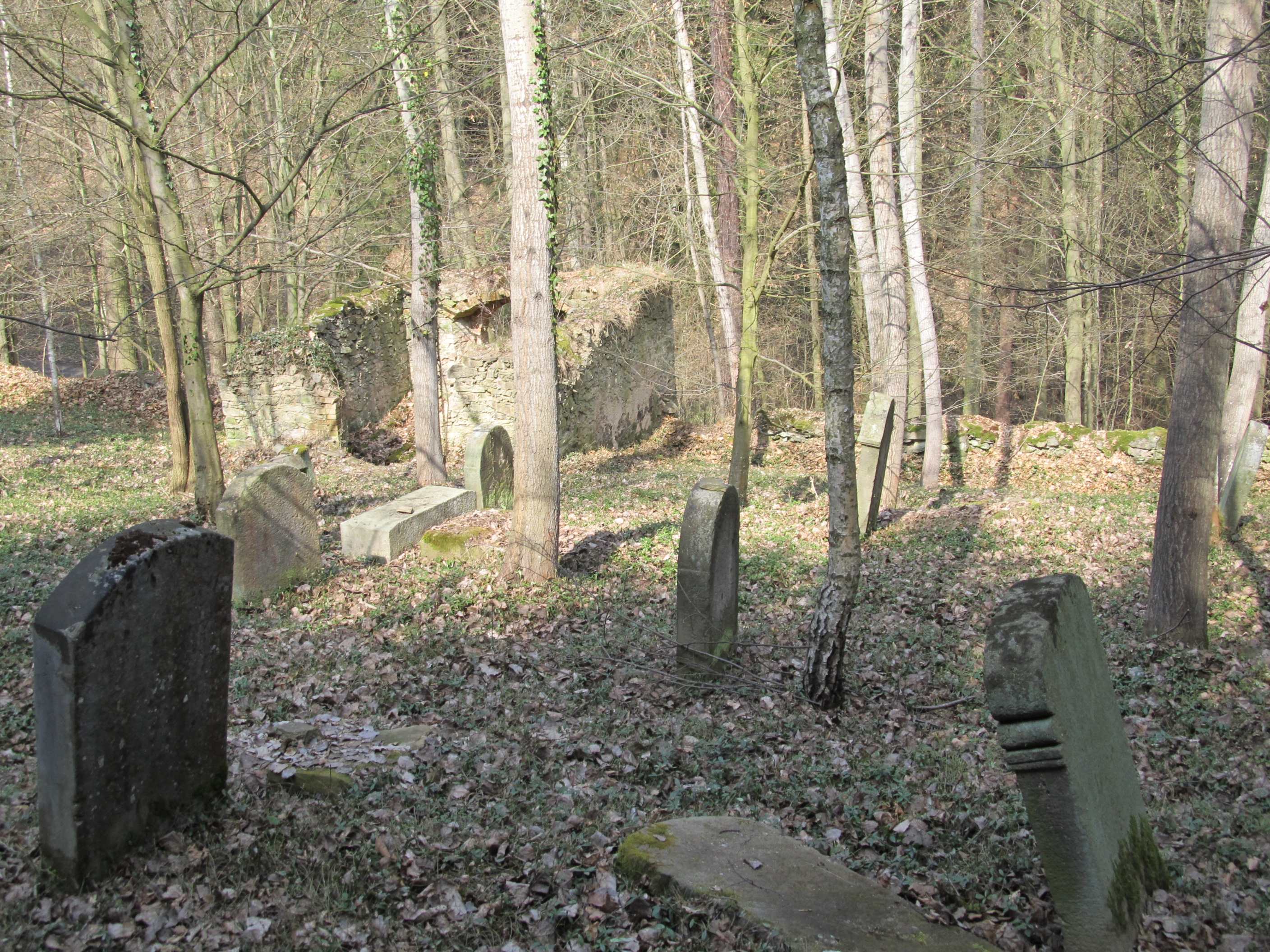 Hřešihlavy ŽH